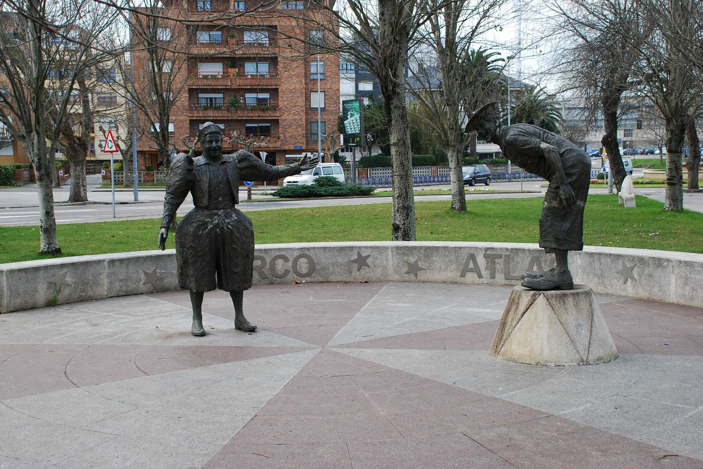 Monumento a los hermanos Tonetti en Santander (Cantabria, España)